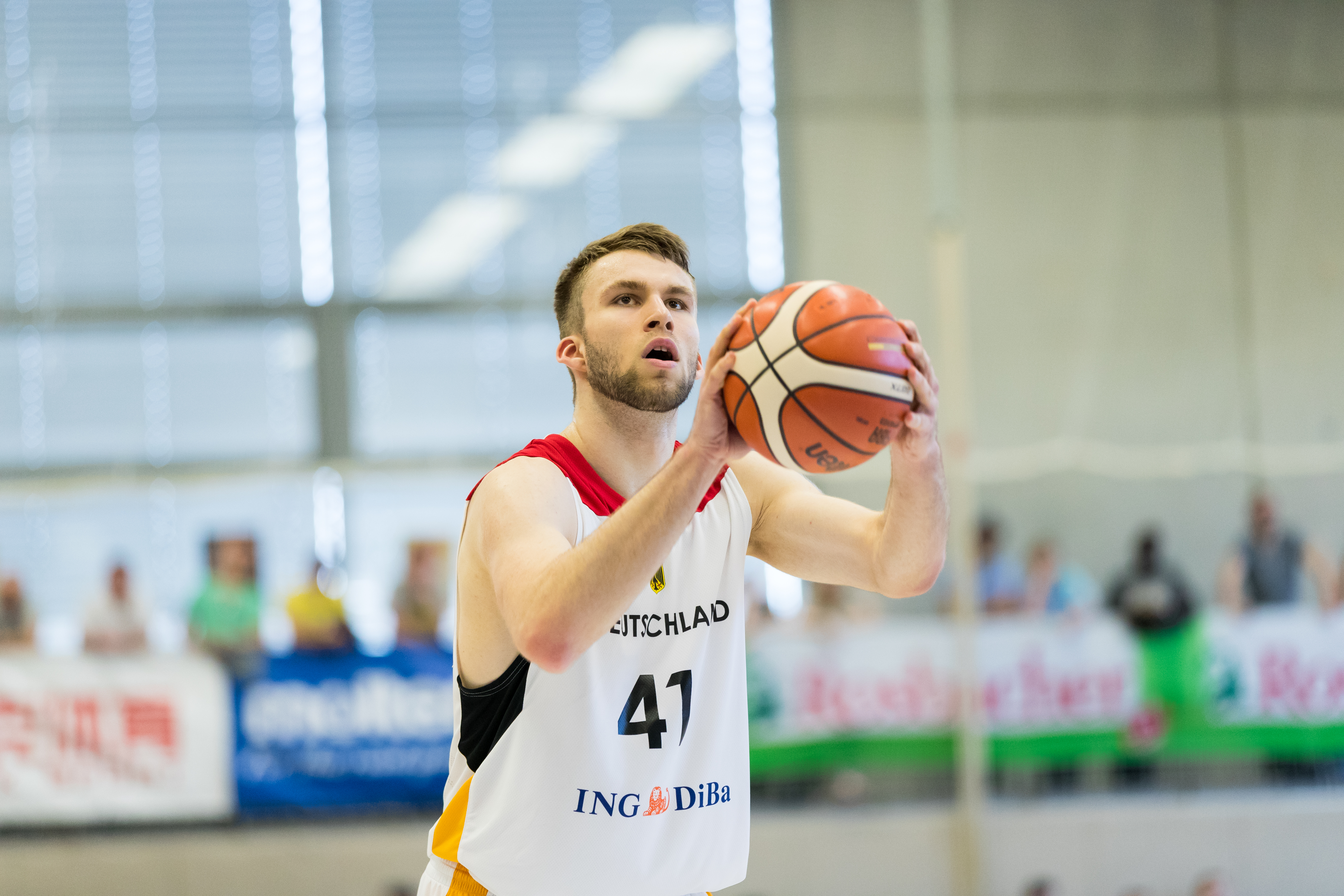 Australia vs Germany 66:88 during final Basketball Albert Schweitzer Turnier at GBG Halle, Mannheim, Baden-Württemberg, Germany on 2018-04-07, Photo: Sven Mandel